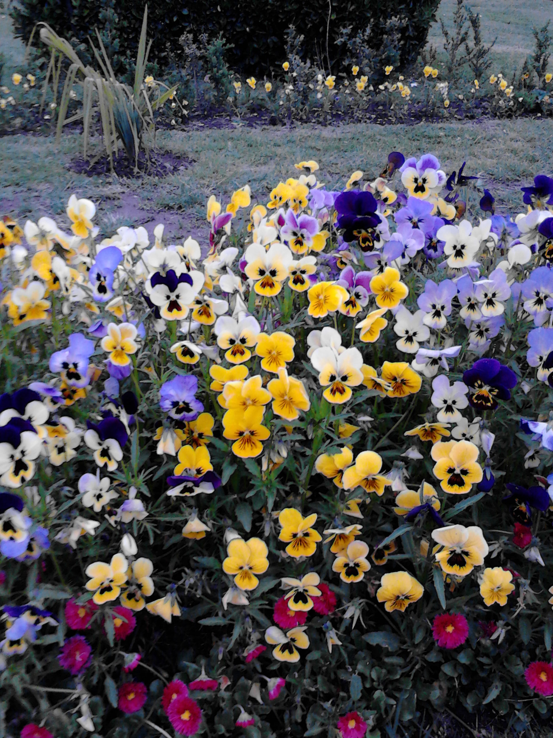 काश्मीर च्या चाश्मेशाही बागेतील एक छायाचित्र